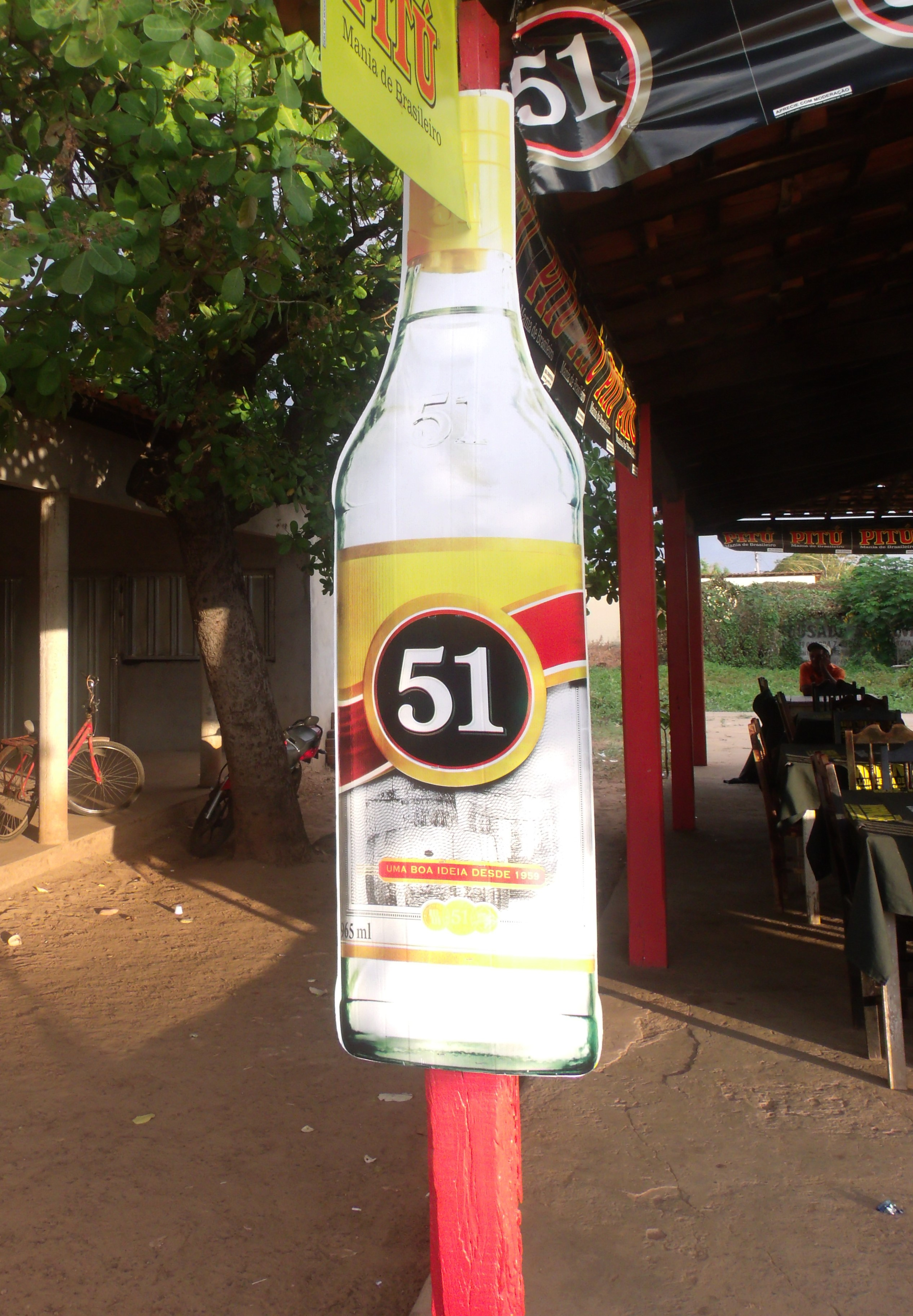 Litro ampliado de garrafa da cachaça 51 na margem da rodovia BR-343.